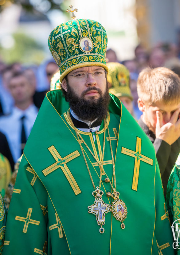 Літургія-Онуфрія-Великого-26-684x1024